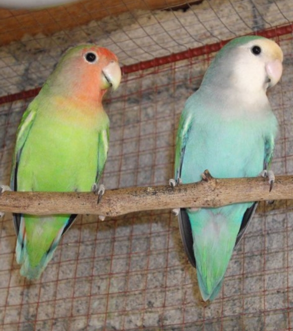 রিং বার্ডের মত এদের চোখের চারপাশে কোনো সাদা বর্ডার থাকেনা। নিচের ৩ & ৪ নং ছবি দেখলে পরিষ্কার বুঝতে পারবেন। পিচ ফেস, লুটিনো পিচ ফেস, যেকোনো ধরণের অপালিন মিউটেশনের লাভবার্ডই নন রিং।